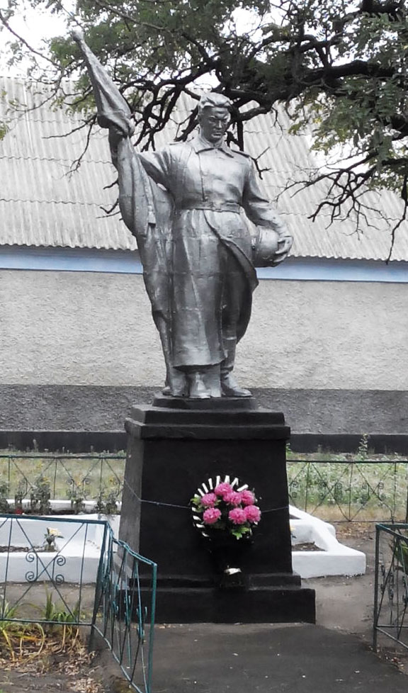 Могила загиблих воїнів при визволенні с. Мар'ївка